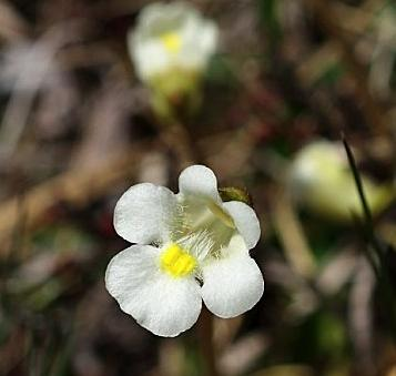 grassette des Alpes